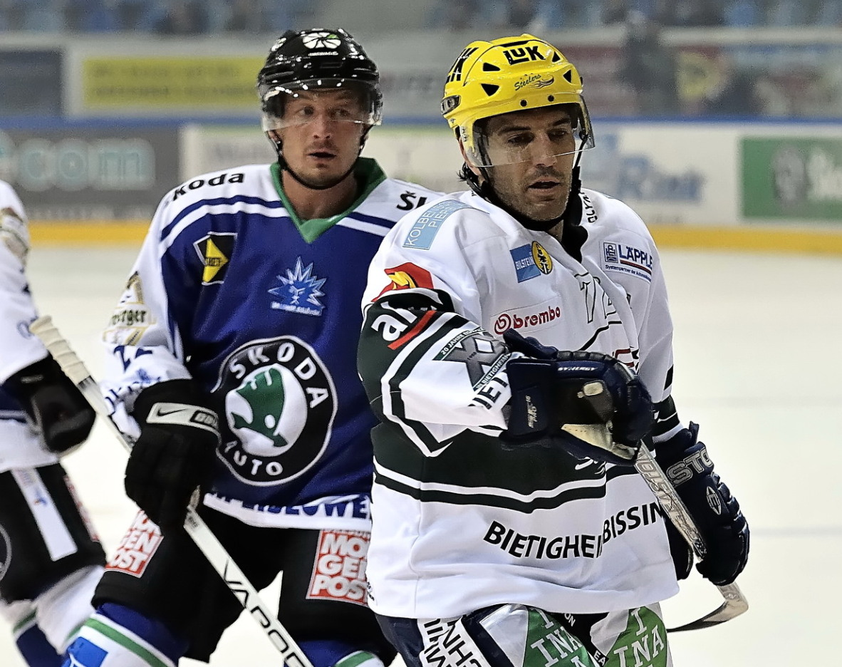 Gregory Schmidt, Bietigheim Steelers; im Hintergrund #22 Petr Sikora der Dresdner Eislöwen